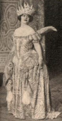 Péchy Erzsi magyar énekesnő a bécsi Johann Strauss Theaterben